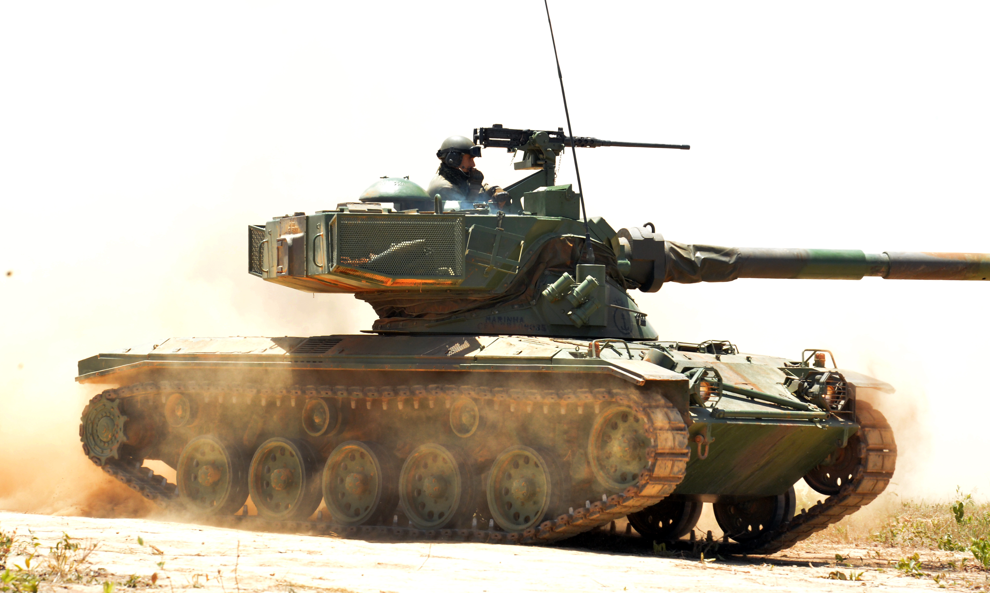 Sob sol forte e em pleno cerrado brasileiro 2,4 mil fuzileiros navais vindos do Rio de Janeiro estão em operação real de guerra. São exercícios que têm por objetivo preparar o militar da Marinha do Brasil para situações das mais corriqueiras às mais extremas. Foto: Tereza Sobreira